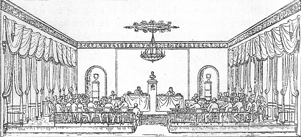 Roskilde Stændersal i 1830'erne.